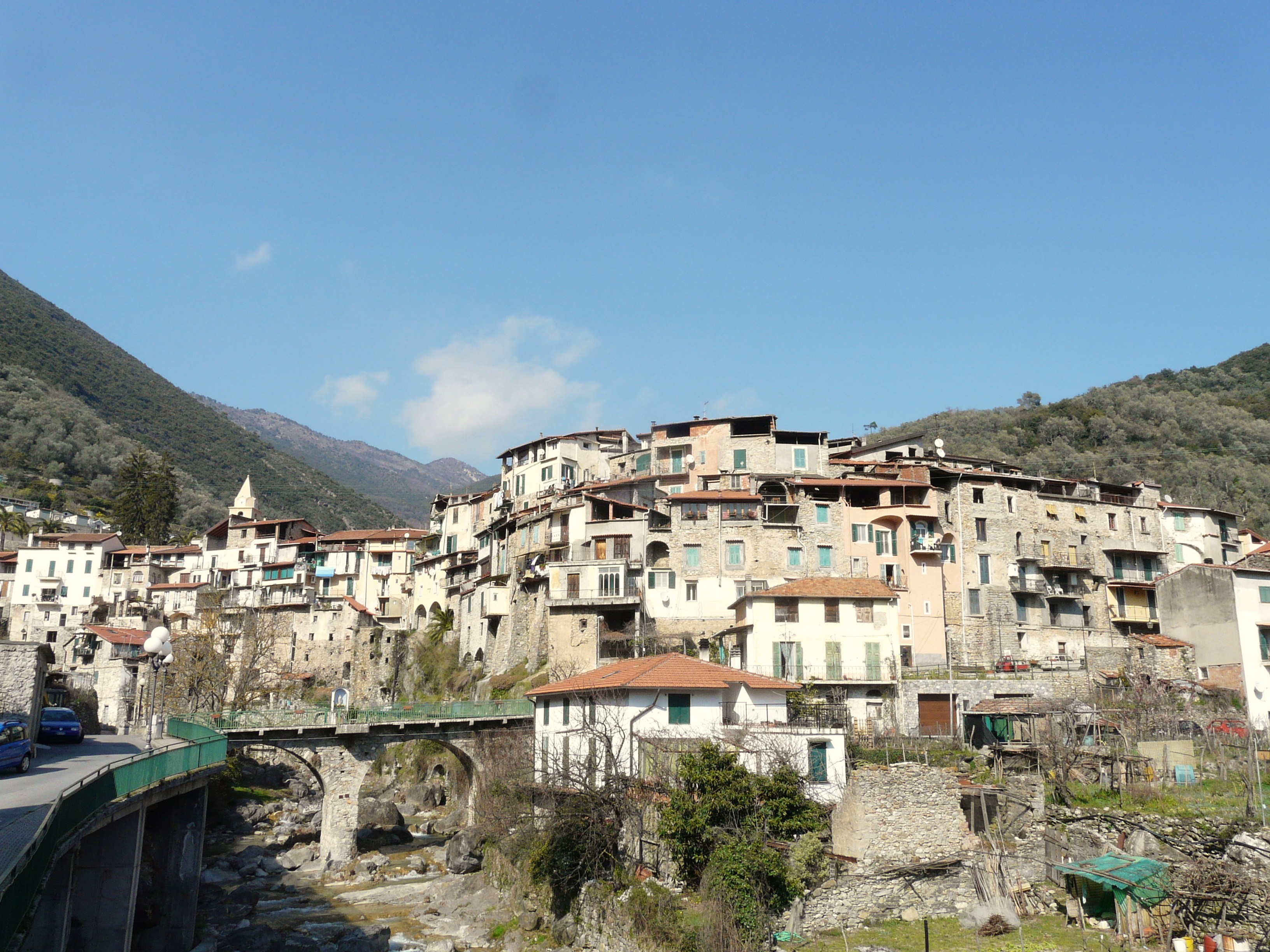 Rocchetta Nervina, Liguria, Italia